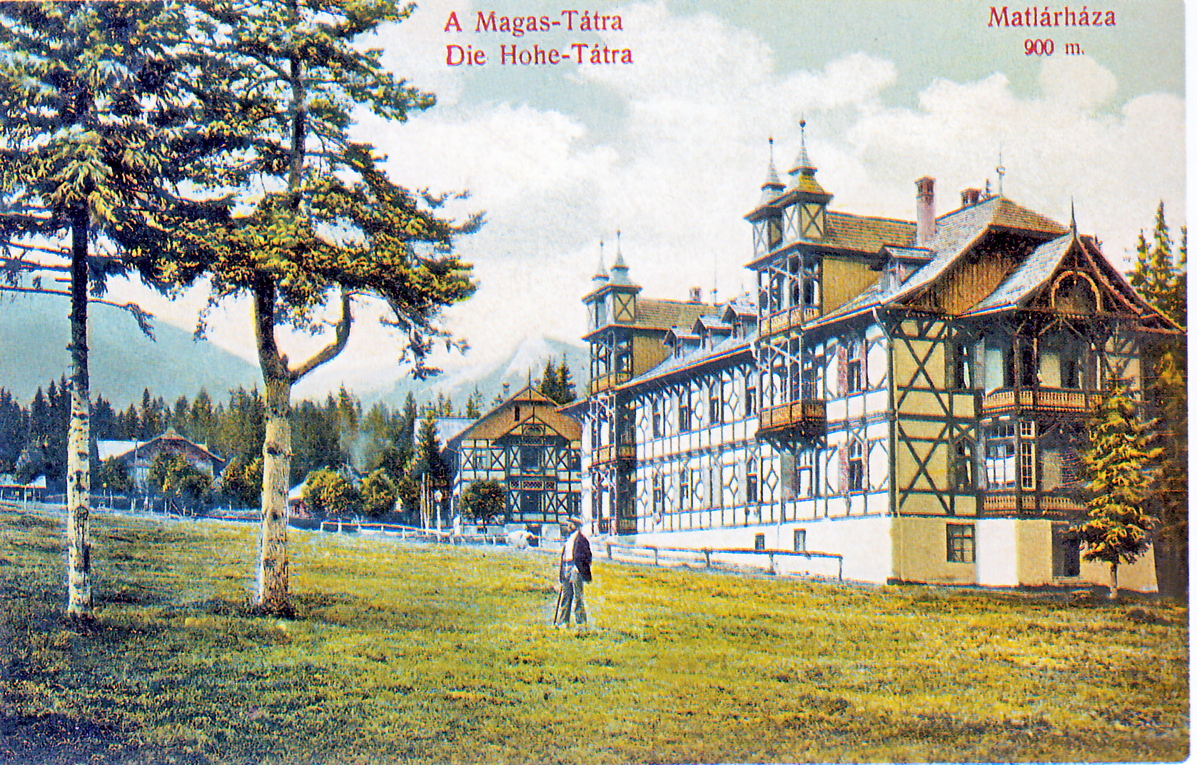 Hotel Tatra - hrazdená 36- izbová budova, ktorú vybudoval zakladateľ Tatranských Matliarov Matej Loisch st.. Architektom bol Gedeon Majunke